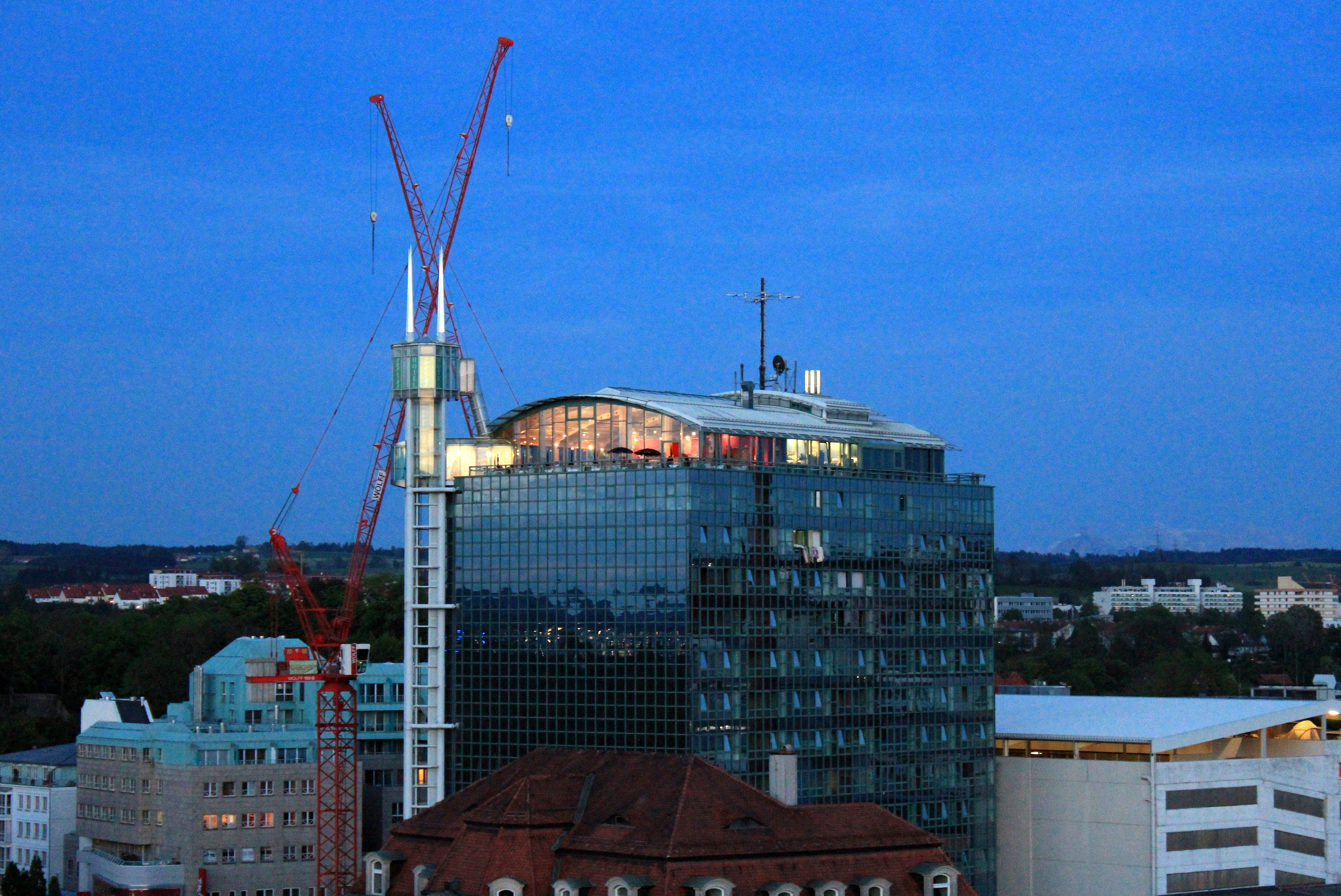 Parkhotel in Kempten